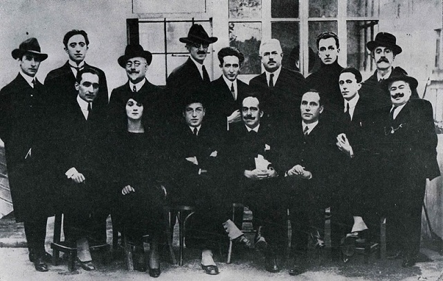 Foto di gruppo alla Redazione Avanti! 1921Scalarini è l'ultimo in piedi a destra, davati a lui Giuseppe Romitaal centro seduto il terzo da sinitra Pietro Nenni.